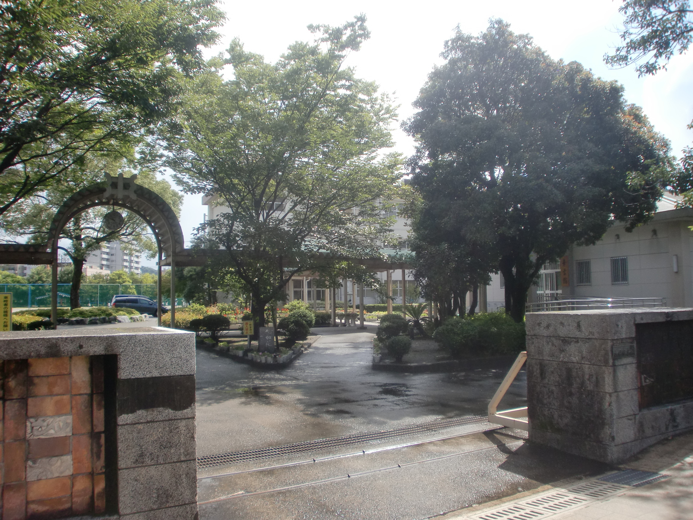 鹿児島市立長田中学校の外観